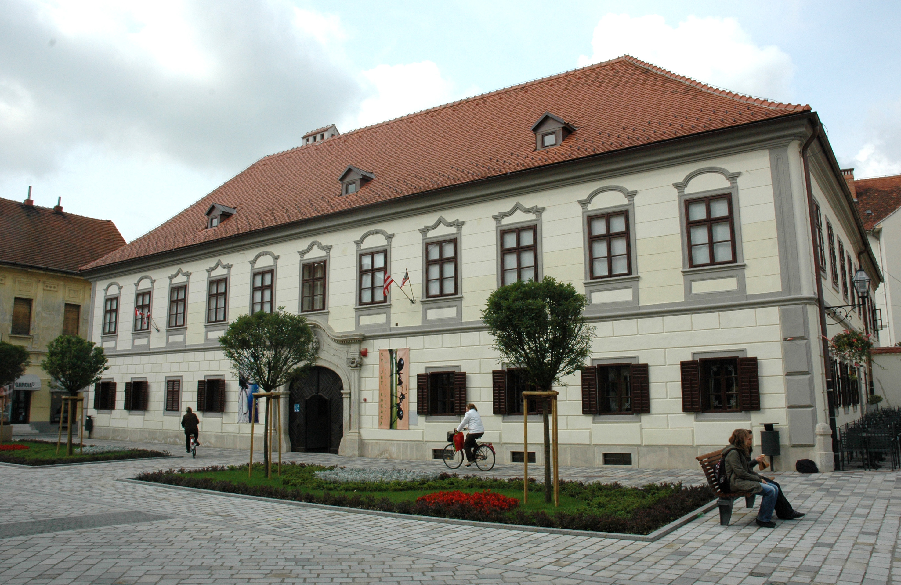 Palača Herzer u Varaždinu.